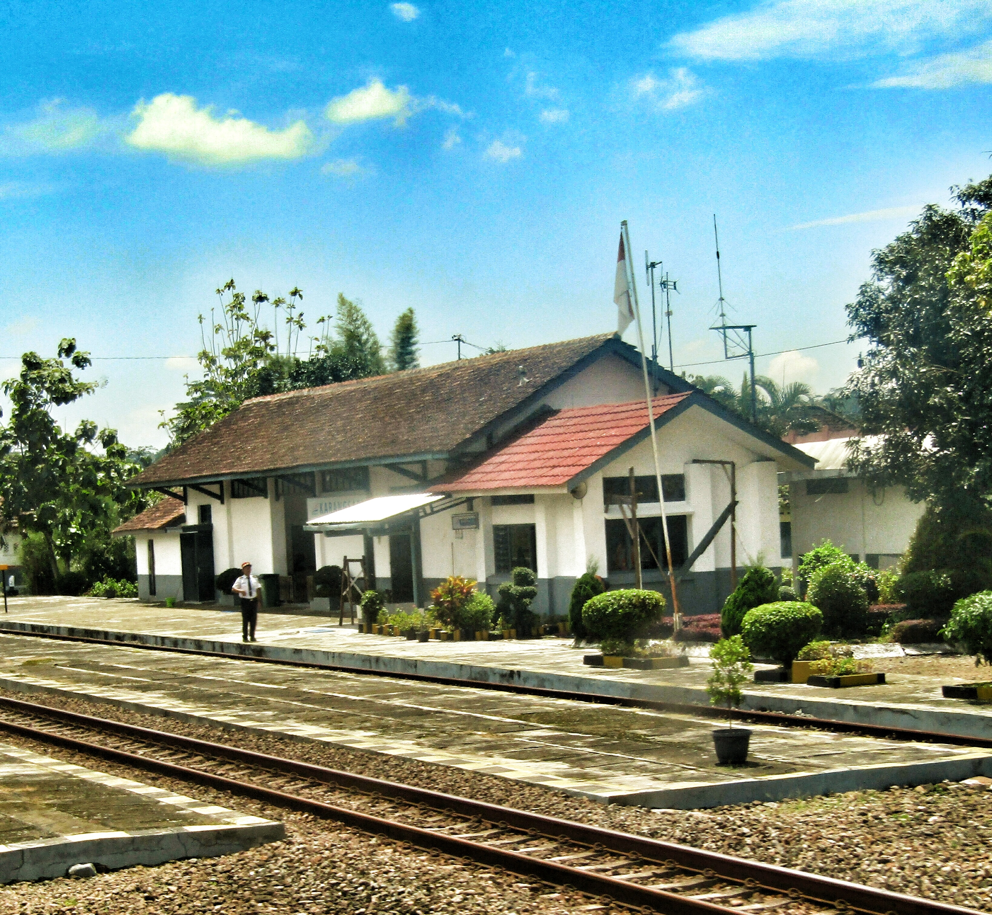 Tampak peron Stasiun Karangsari, 2019